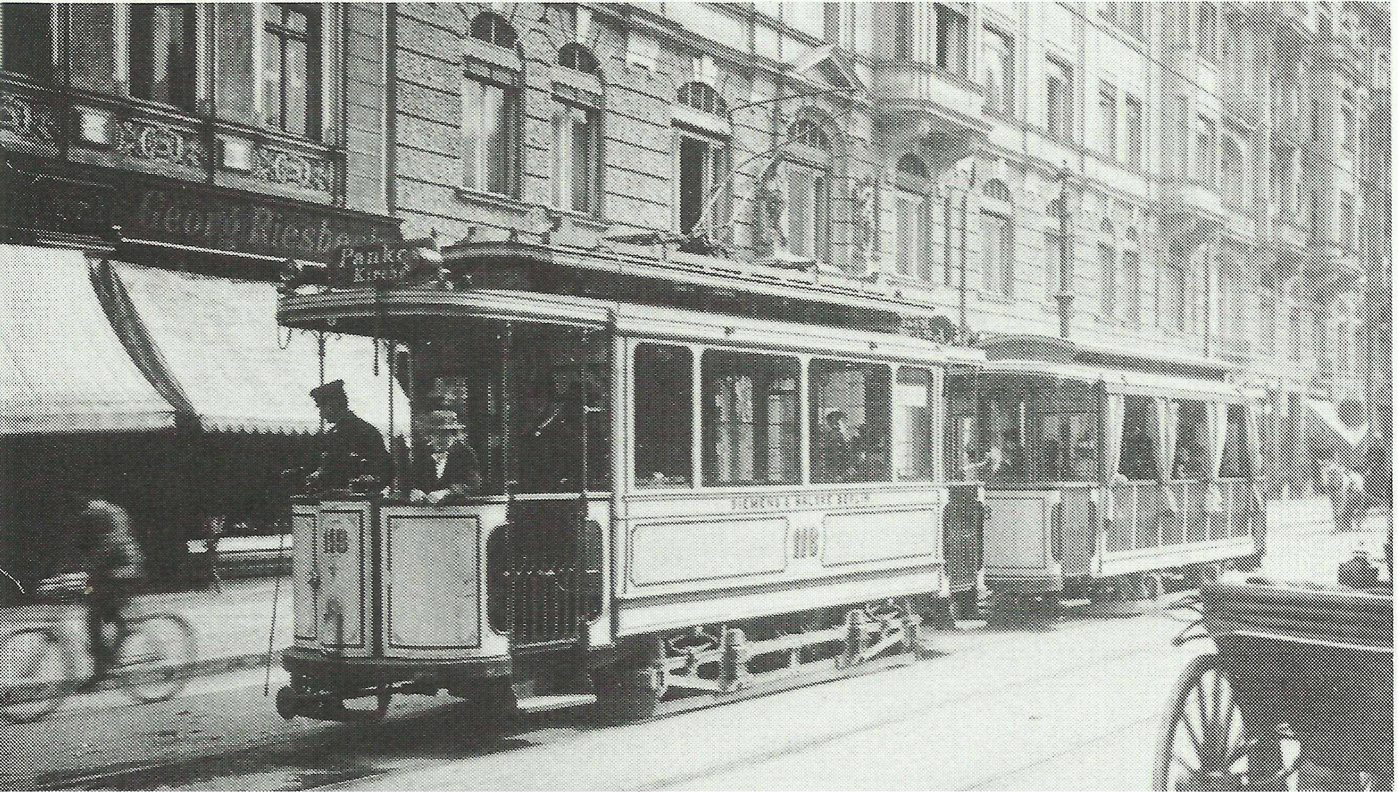 Triebwagen 5 und Beiwagen 55 der Elektrischen Straßenbahnen in Berlin von Siemens & Halske in der Prinz-Louis-Ferdinand-Straße (heute Planckstraße)